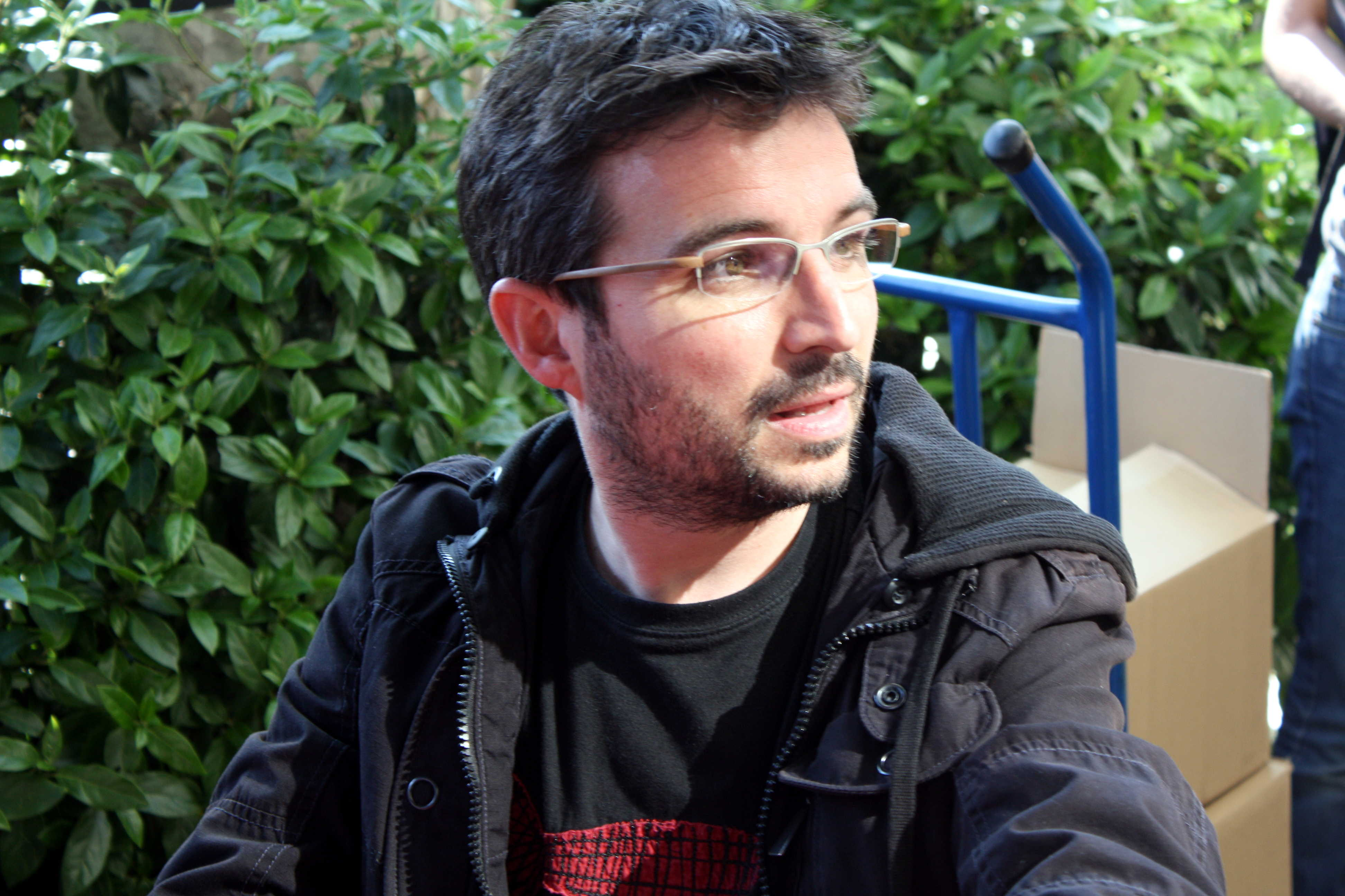 Jordi Evole en 2009 firmando libros con motivo de Sant Jordi.